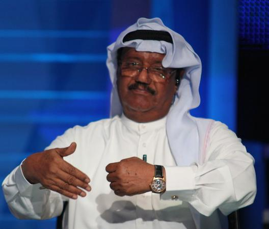 Ghanem Al-Saleh